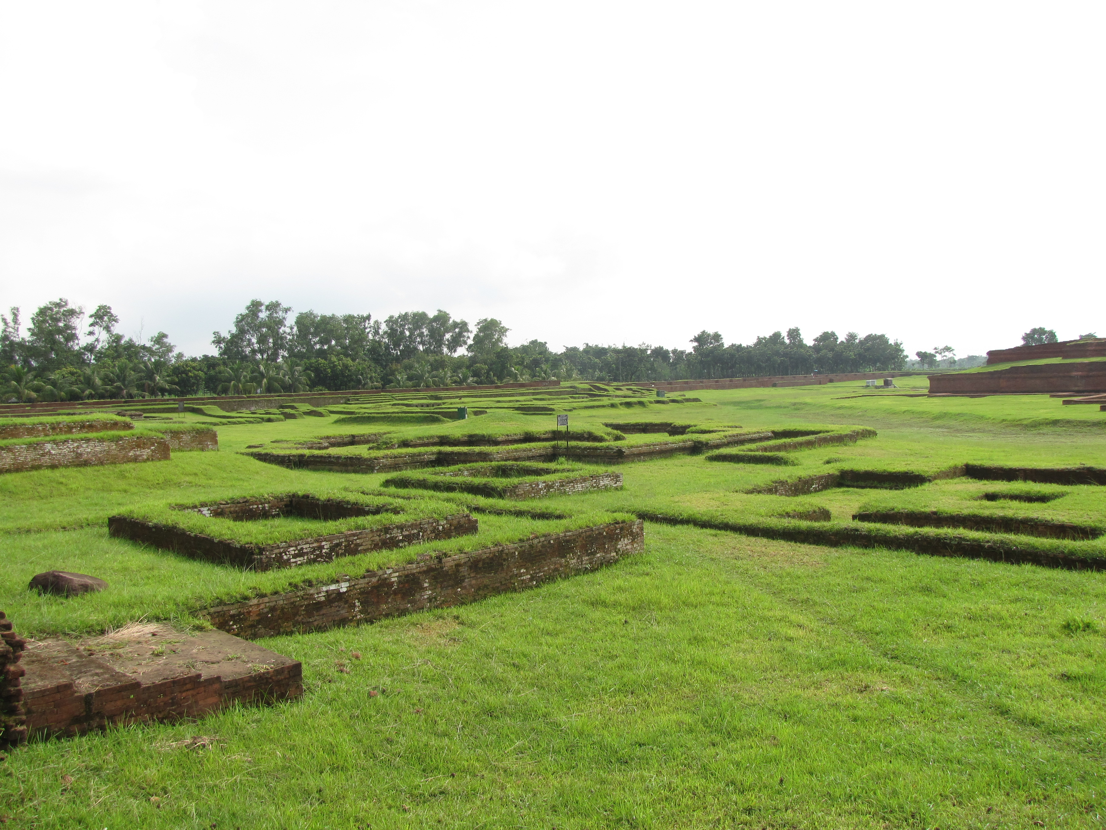 Somapura Mahavihara in Bangladesh.